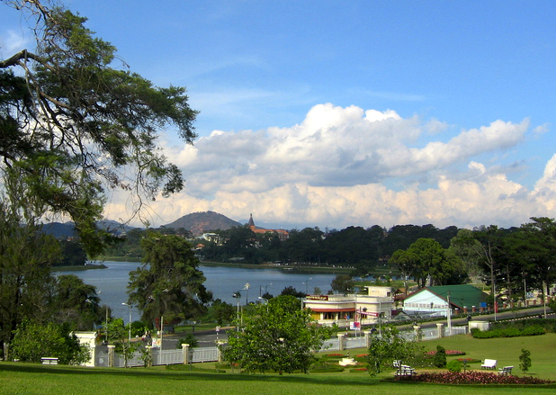 Nhin xuong Ho Xuan Huong...